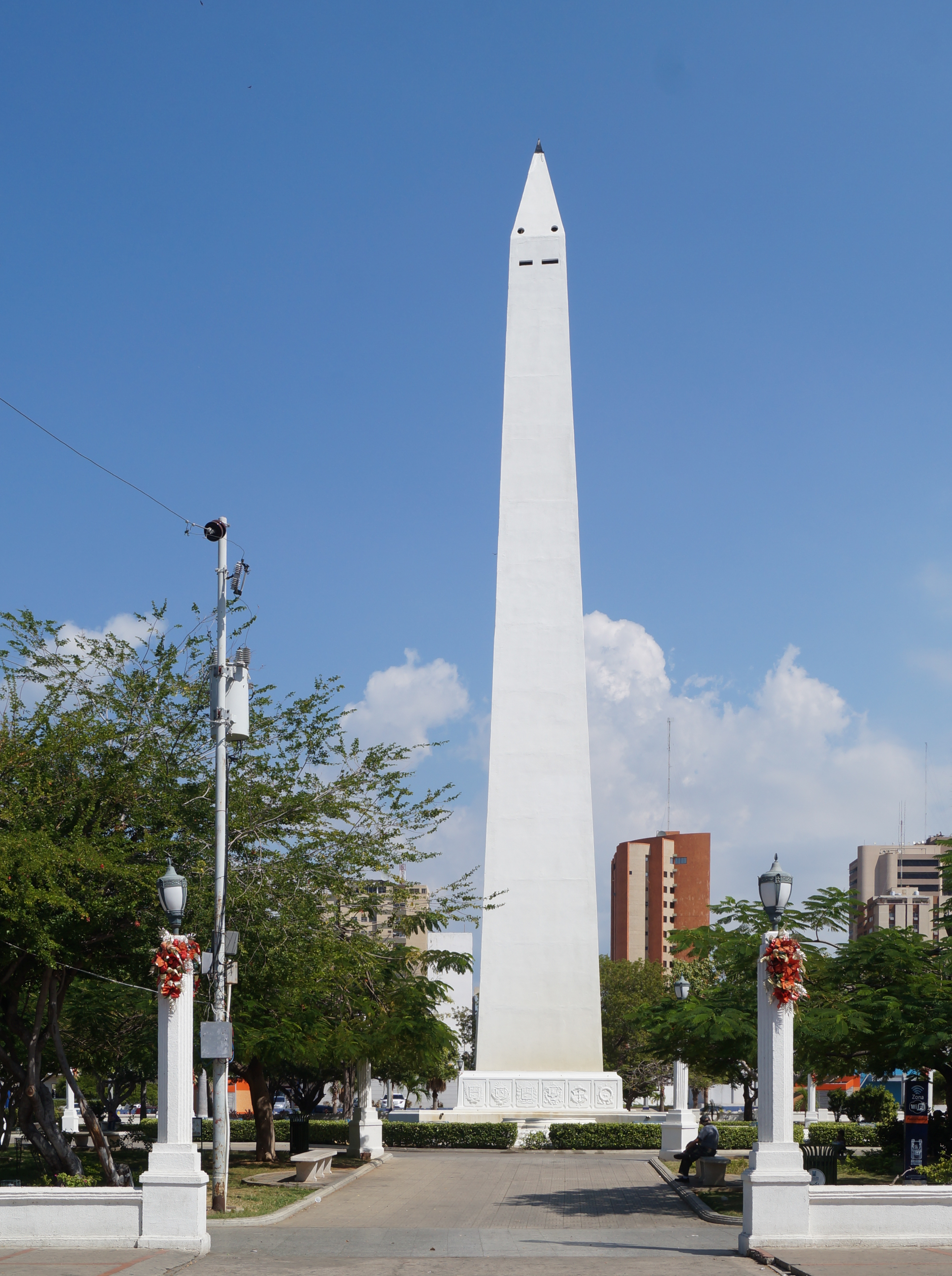 La Plaza de La Republica fue construida en 1945 en conmemoración al centenario de la muerte del general Rafael Urdaneta. Posee un Obelisco de aproximadamente 49 metros de altura., que reposa en una base rectangular en la que se destacan los escudos del Distrito Capital, Dependencias Federales y el de Venezuela.